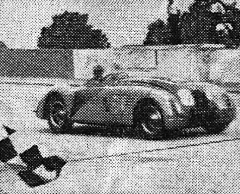 Jean-Pierre Wimille, vainqueur du GP de l'A.C.F. 1936 (Bugatti T57G).